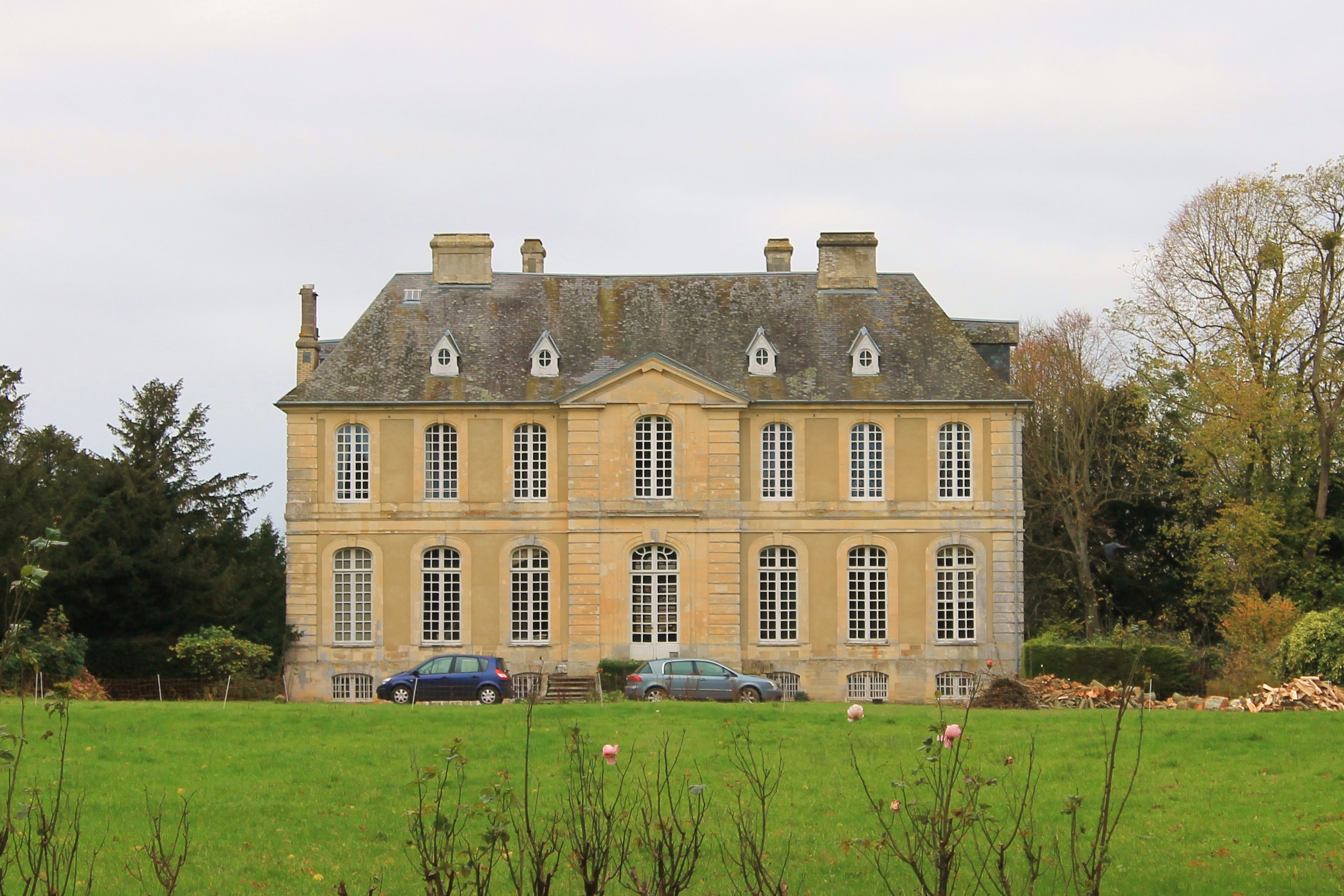 Château de Monts à Monts-en-Bessin (Calvados)